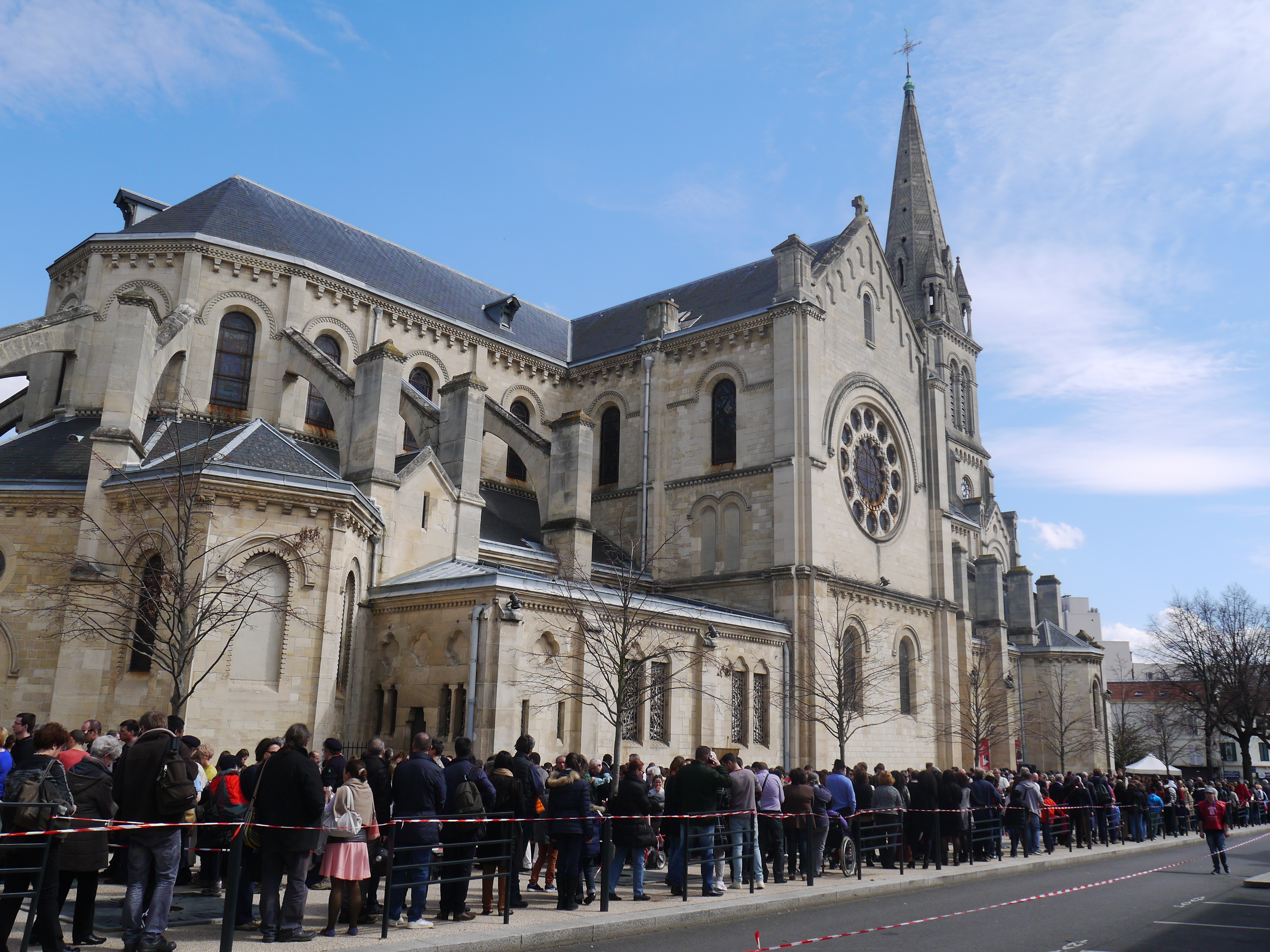 La file d'attente pour l'ostension de la Tunique en 2016.